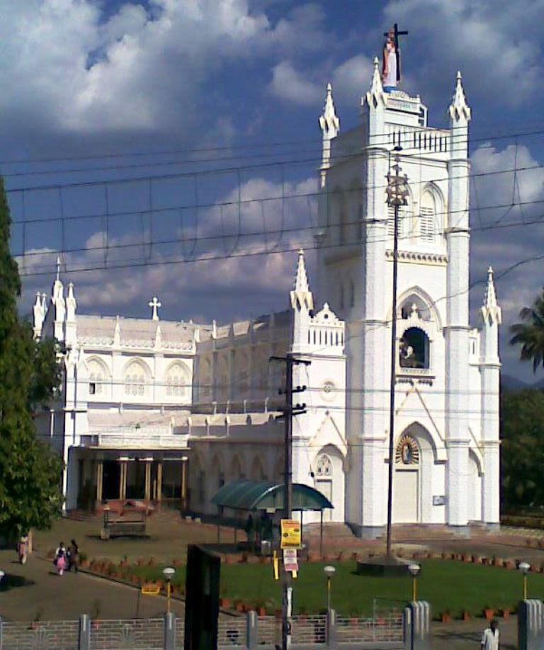 അരുവിത്തുറ സെന്റ് ജോർജ് ഫെറോനാ പള്ളി